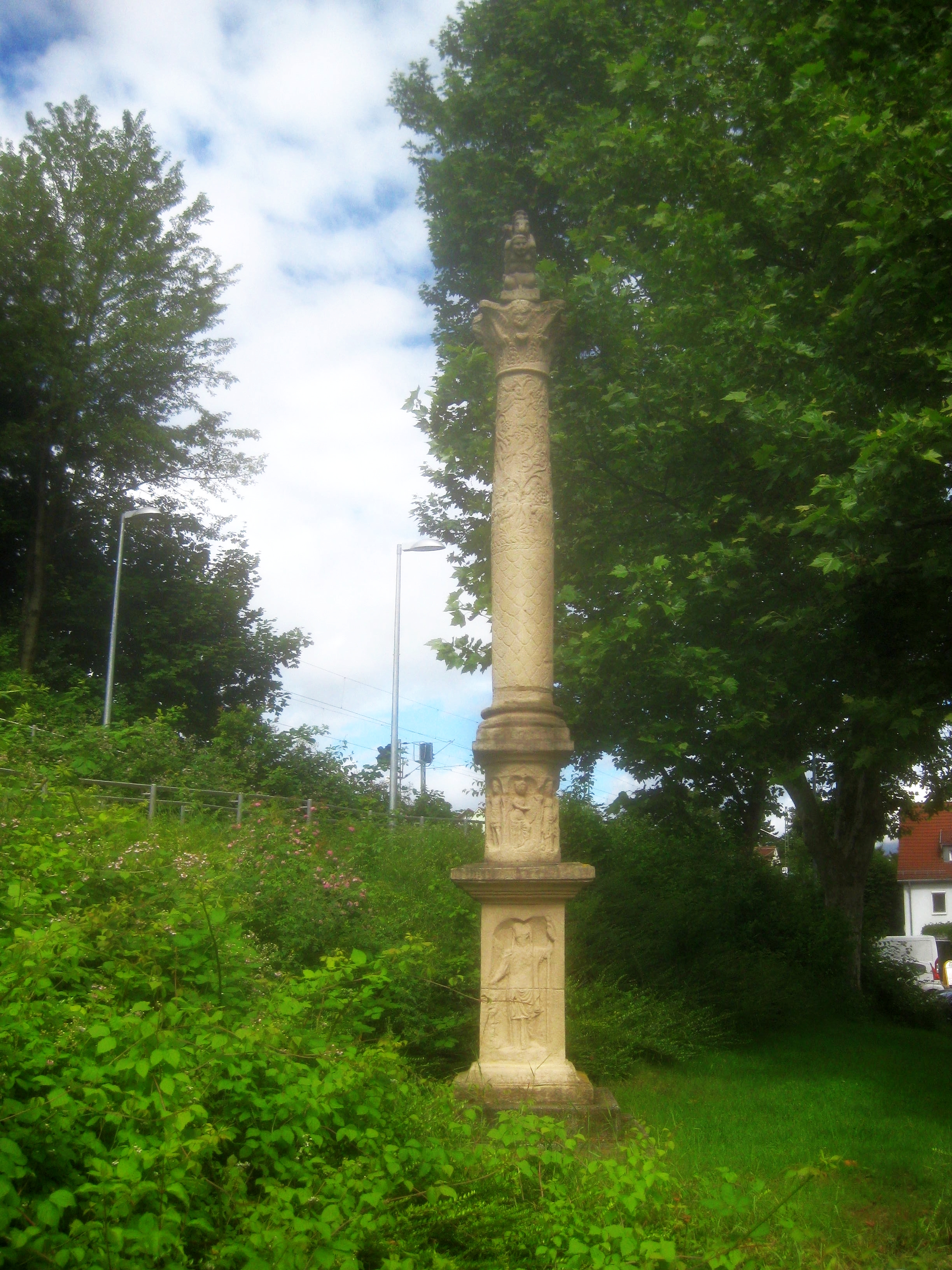 Nachbildung der Jupitergigantensäule von Walheim beim Rathaus von Benningen am Neckar.